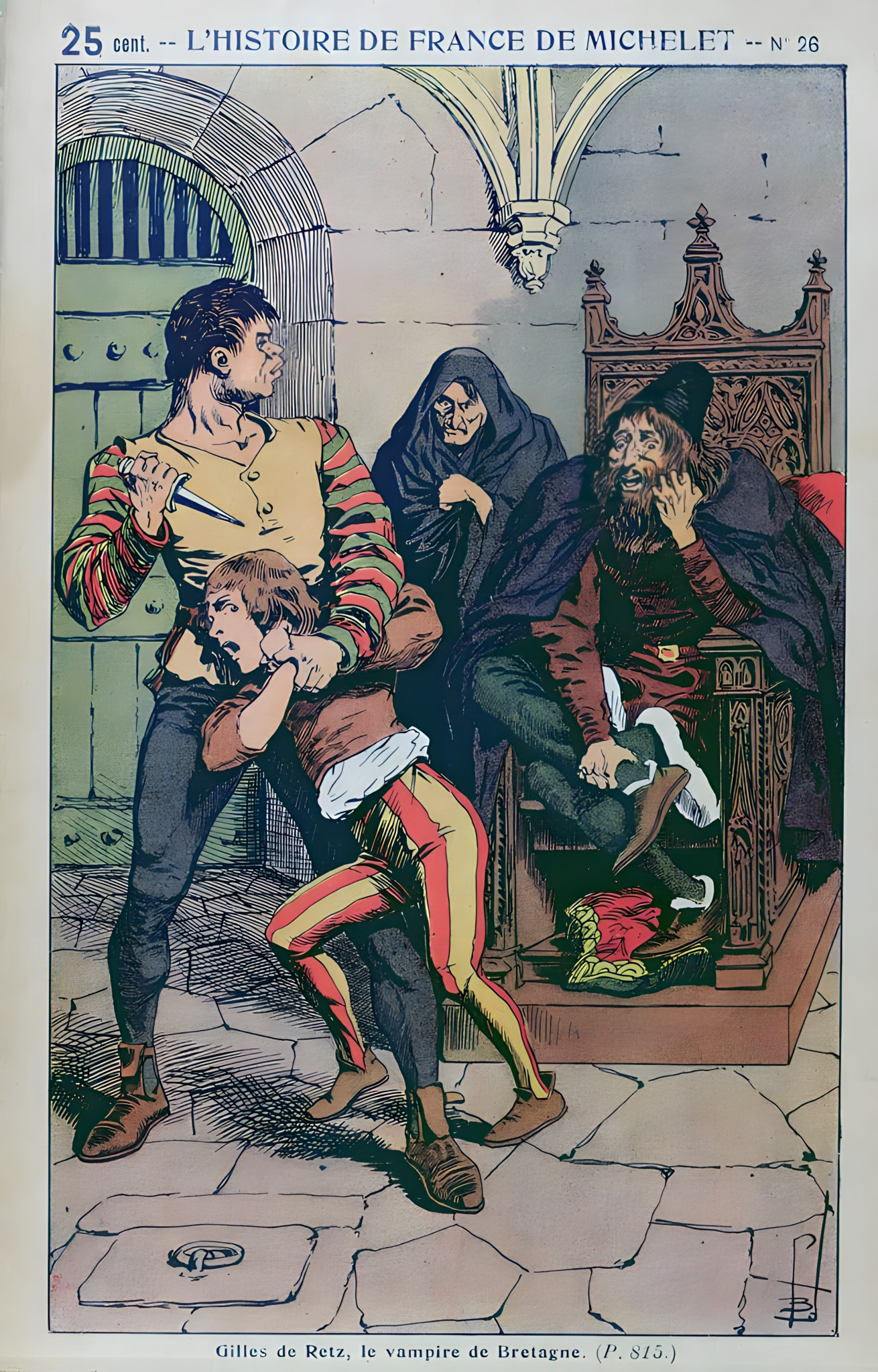 Gilles de Retz, le vampire de Bretagne. Planche illustrée en couleurs de Louis Charles Bombled (1862-1927) pour une édition populaire de l'Histoire de France de Jules Michelet.